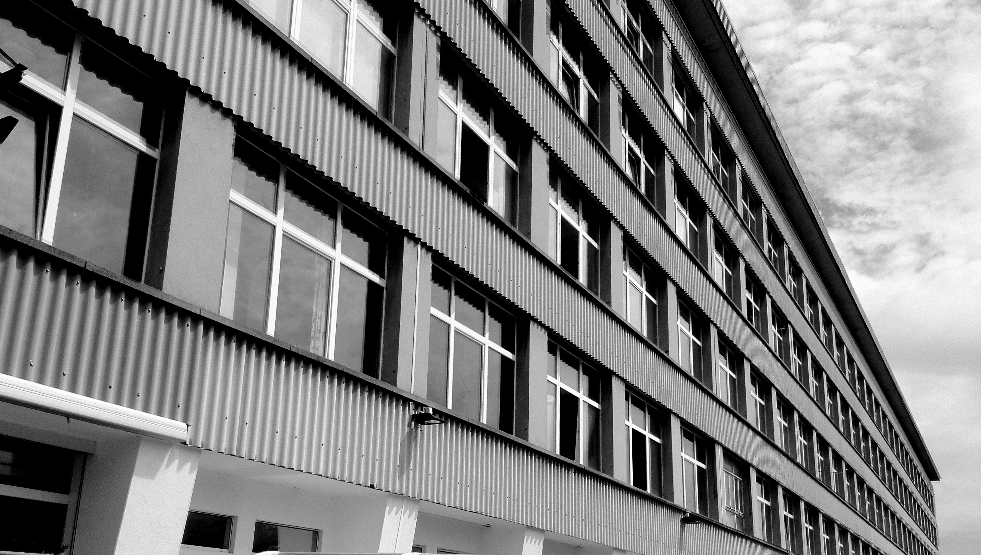 Ancienne usine Paillard SA à Ste-Croix, Suisse (Les trois drapeaux ont été hissés sur le toit de cette nouvelle usine le 4 avril 1951 [selon Feuille d'Avis de Ste-Croix du 04.04.1951] et le déménagement a suivi au cours de l'été 1951)